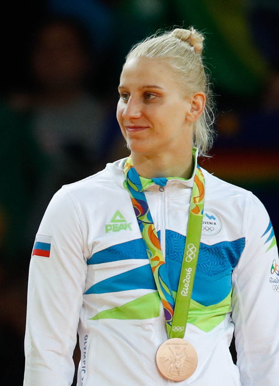 Rio de Janeiro - A judoca brasileira Mayra Aguiar vence cubana na categoria até 78 quilos e ganha medalha de bronze na Rio 2016 (Fernando Frazão/Agência Brasil)